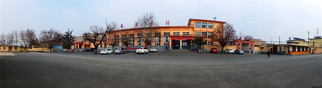 莱芜东站广场全景